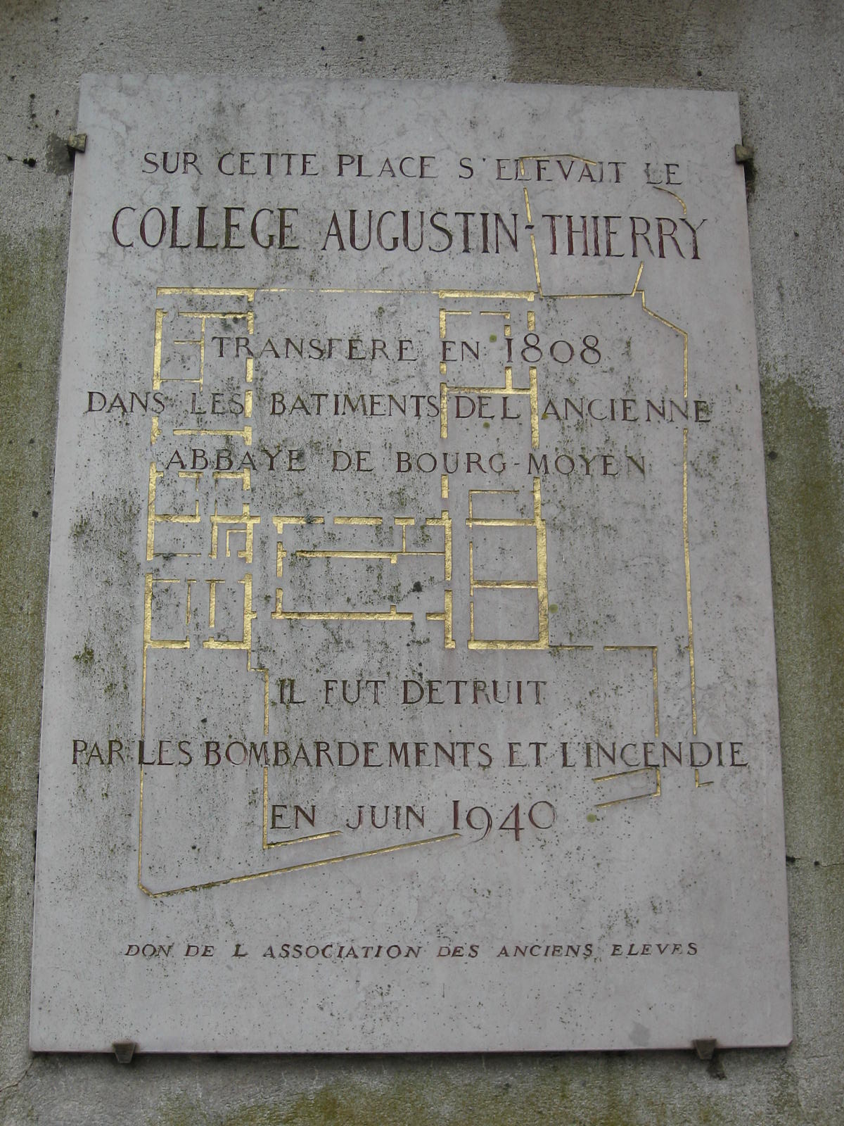 Plaque commémorative du collège Augustin-Thierry, 8 rue du Bourg-Moyen, Blois 2011